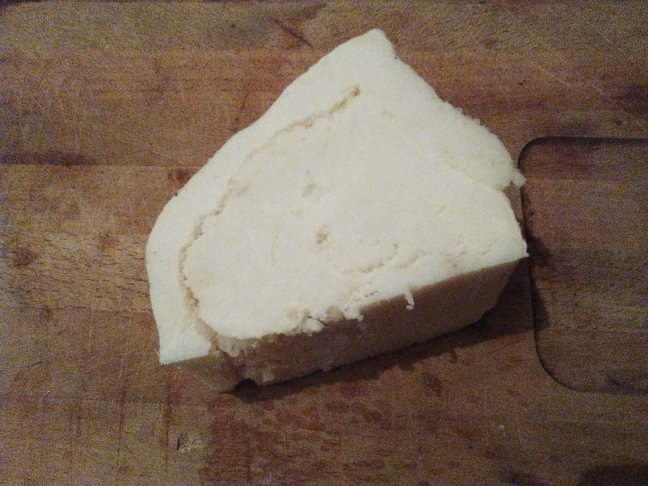 Schweineschmalz